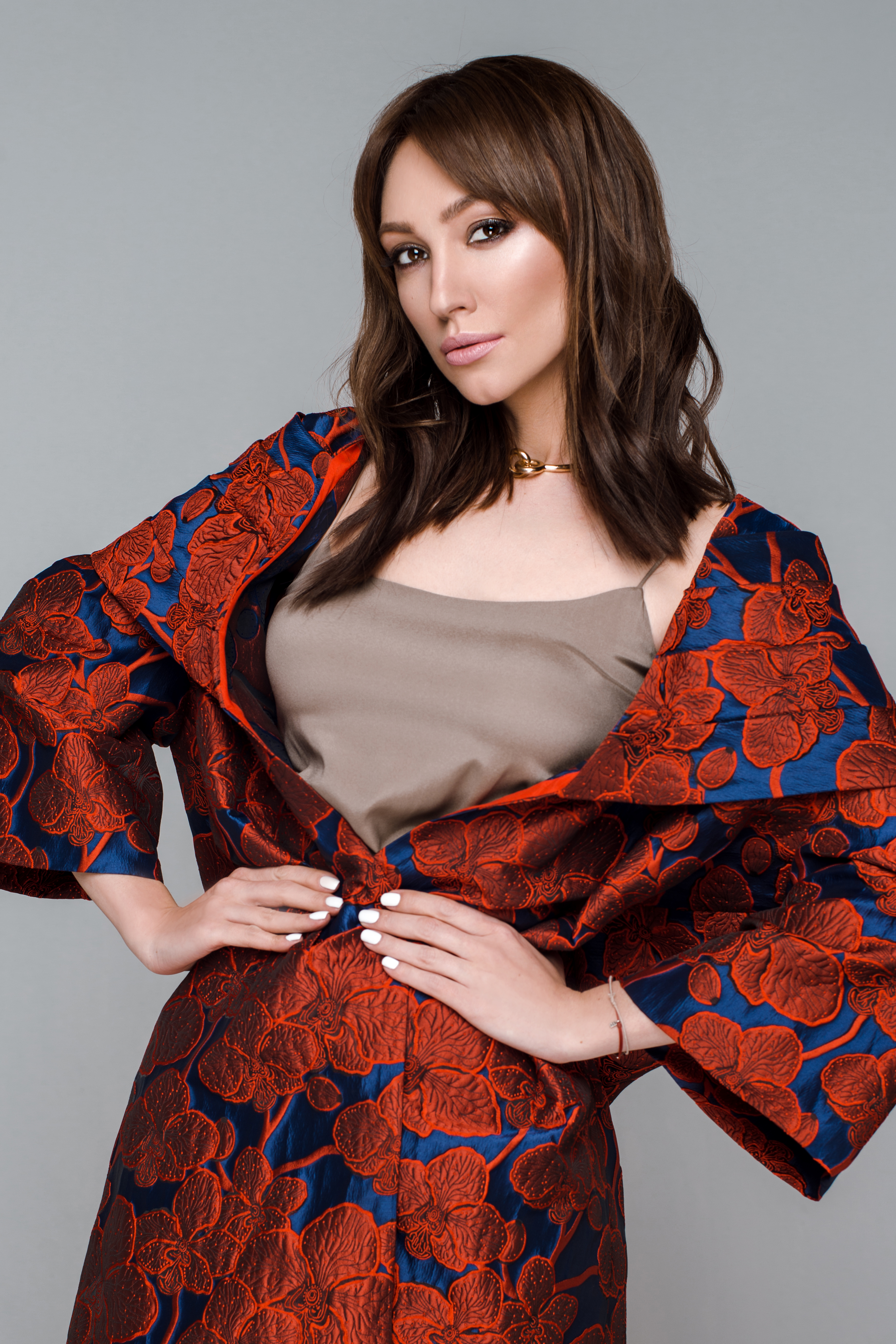 Согдиана - российская певица и актриса.